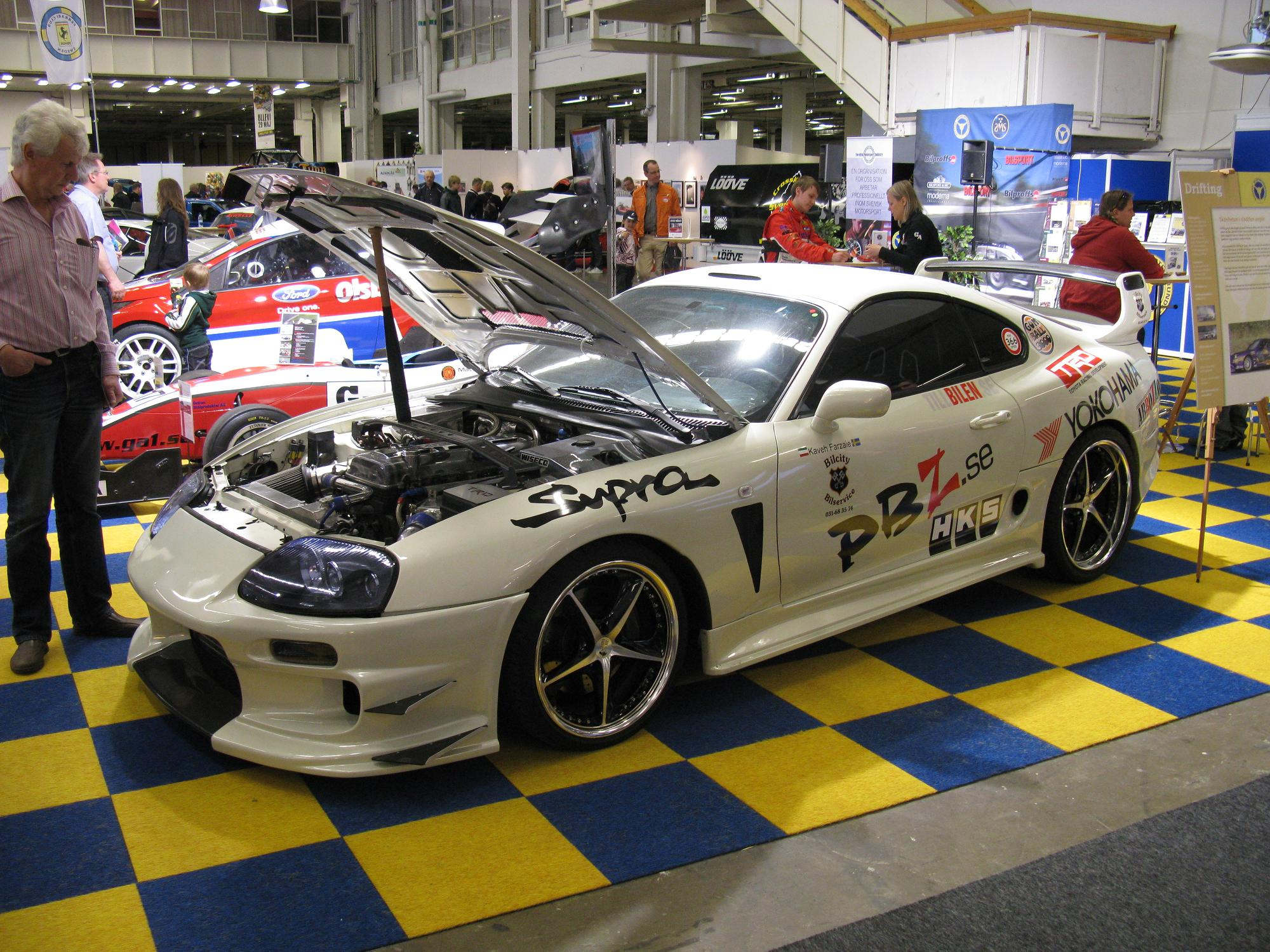 Toyota Supra